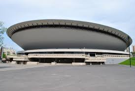 Hala Spodek w Katowicach